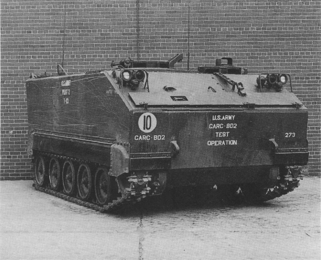 T113, M113 pilot variant